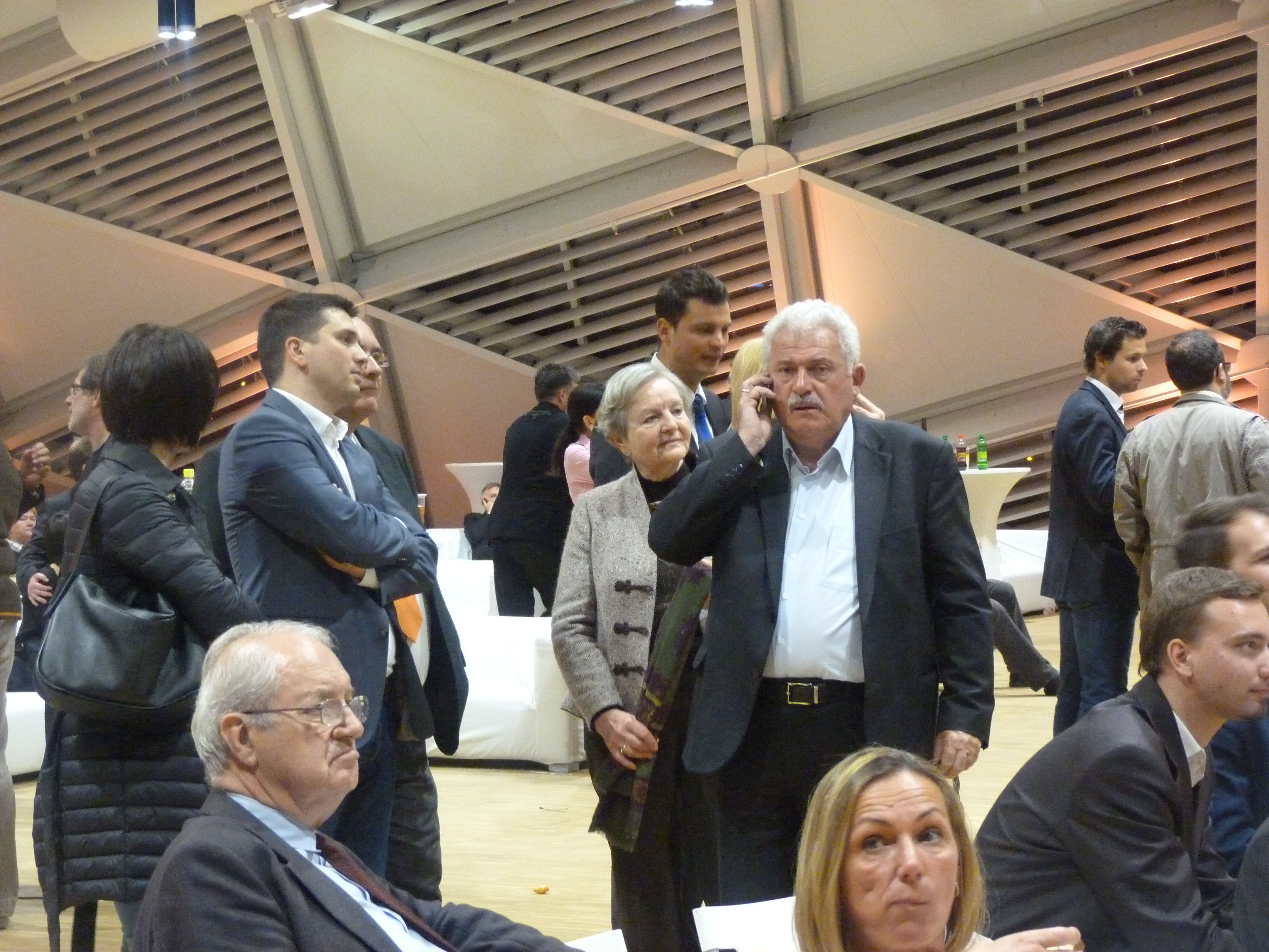 A felvétel 2014. április 6 –án, vasárnap készült Budapesten, a Bálna előtt és a Bálna Eredményváró. (1-51). Ezen a napon tartották Magyarországon az országgyűlési képviselőválasztást. A Bálna előtt gyülekezők az eredményt várták. Az ott felállított pódiumon köszönte meg a választók bizalmát Orbán Viktor. Lévai Anikó, Tőkés László, Jókai Anna, Martonyi János, Bába Iván, Szász Jenő, Gálné Pelcz Ildikó, Illés Zoltán, Andy Vajna, Bayer Zsolt, Pataky Attila, Vidnyánszky Attila, Sára Sándor. A választáson a FIDESZ-KDNP pártszövetség 2010 után újra kétharmados többséget szerzett a választáson. Képviselői helyek: FIDESZ-KDNP : 133, MSZP–Együtt–DK– PM–MLP: 38, Jobbik: 23, LMP: 5 képviselői hely. Az országos listákra leadott szavazatok száma: Fidesz–KDNP 2 264 730, MSZP–Együtt– DK–PM–MLP: 1 290 804, Jobbik 1 020 476, LMP: 269 413. Forrás: FIDESZ-KDNP: újra kétharmad hozzáférés: 2014.04.14 ©© Derzsi Elekes Andor, Budapest, 2014, A kép és filmfelvételek egészben, vagy részletekben másolását, bármilyen úton történő sokszorosítását és felhasználását a szerző ellenérték nélkül, jogutódjaira is kihatóan megengedi. Az engedély kiterjed a kereskedelmi célú hasznosításra is. Kéri azonban nevének feltüntetését a felhasználás során. A Metapolisz sorozat valamennyi képe és filmje Creative Commons alatti valamint kereskedelmi - for profit - célra is felhasználható. Ajánlott hivatkozás: Derzsi Elekes Andor: Metapolisz DVD line